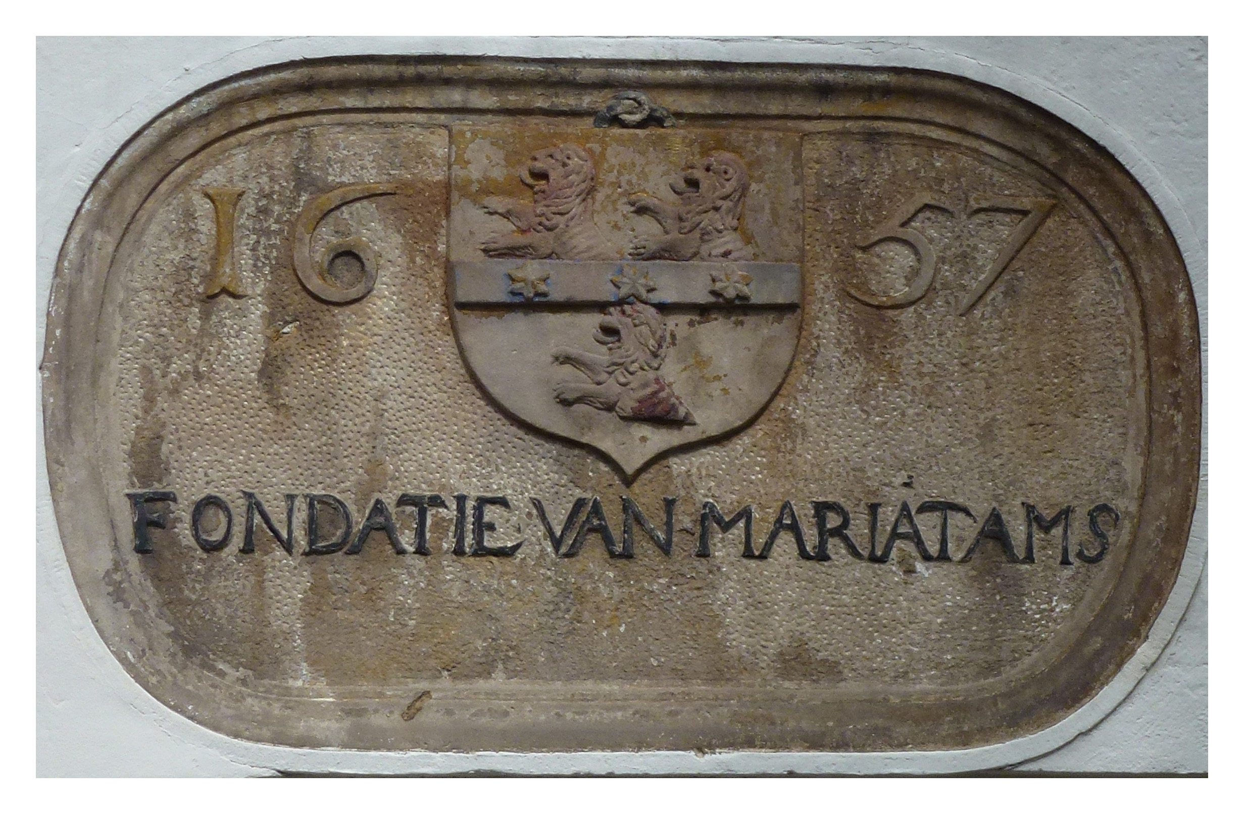 Gevelsteen Nieuwehaven 146-148, Gouda. Boven het poortje van het voormalig Hofje van Tams. Op de gevelsteen: Schild met 3 halve leeuwen en een liggende balk met drie sterren, het jaartal 1657 en de tekst: Fondatie van Maria Tams